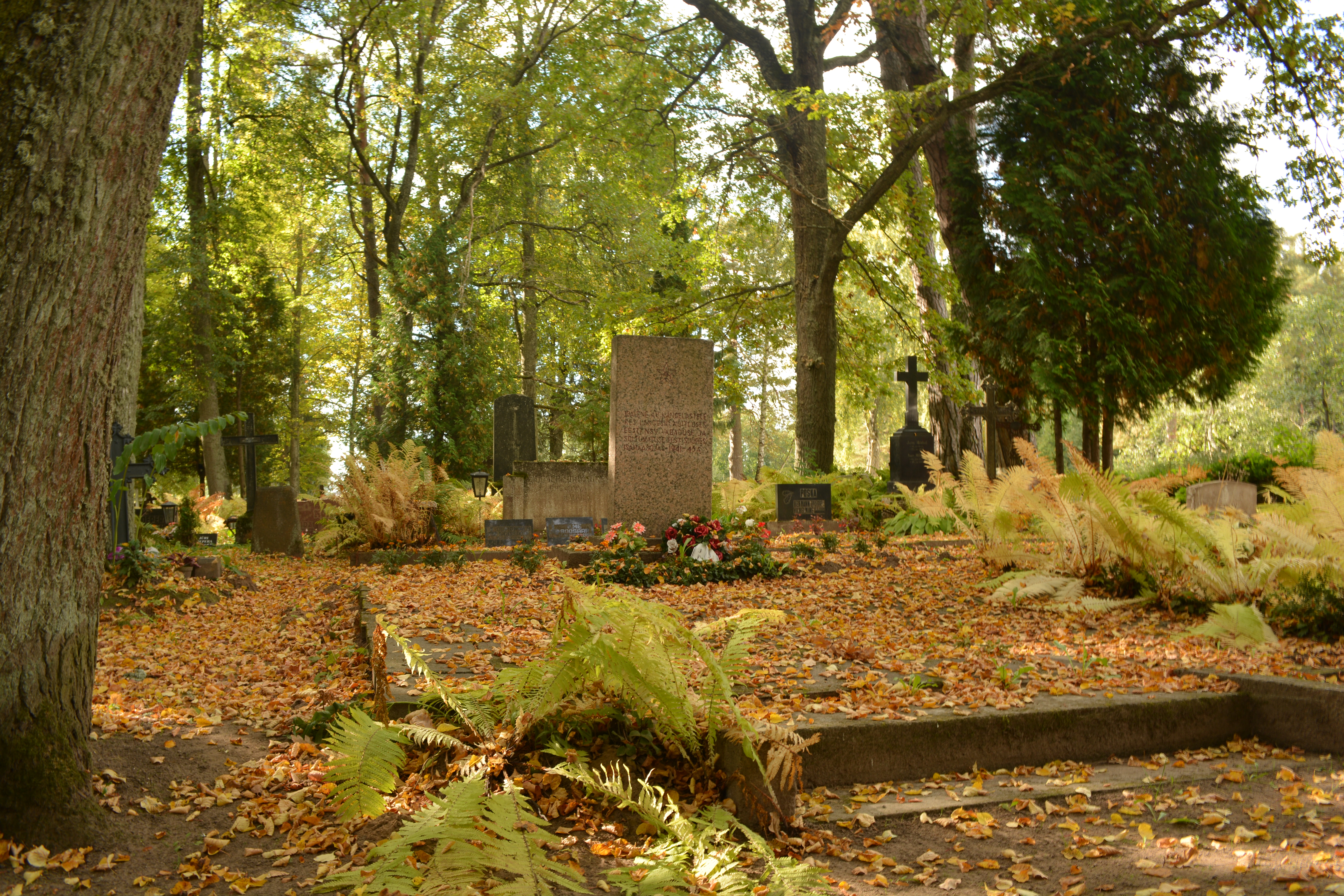 II ms hukkunute ühishaud